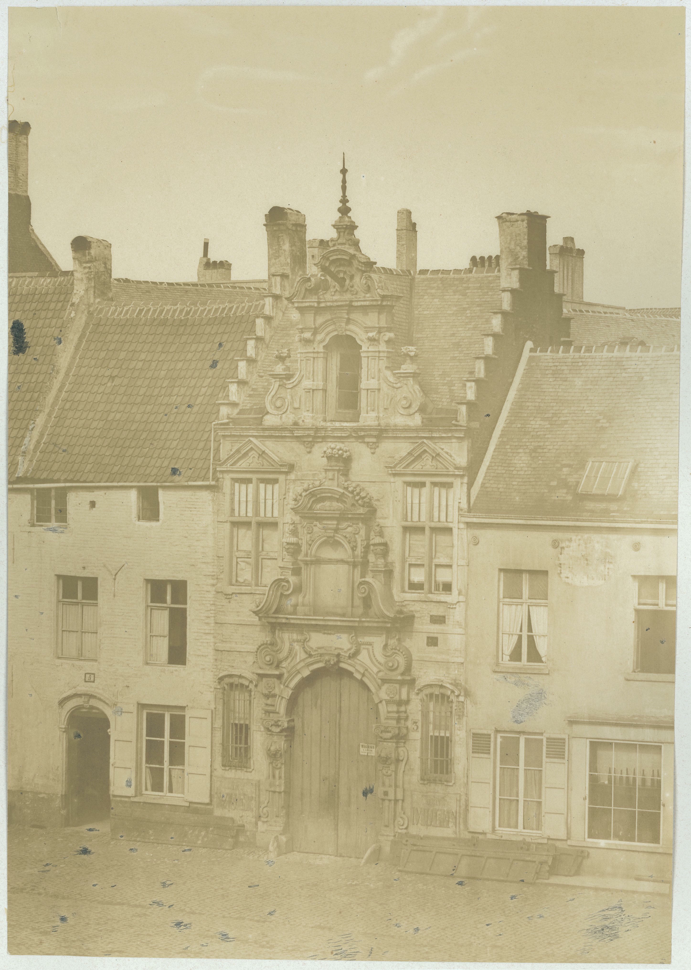 Klooster: Ancien convent du Vieux Monté